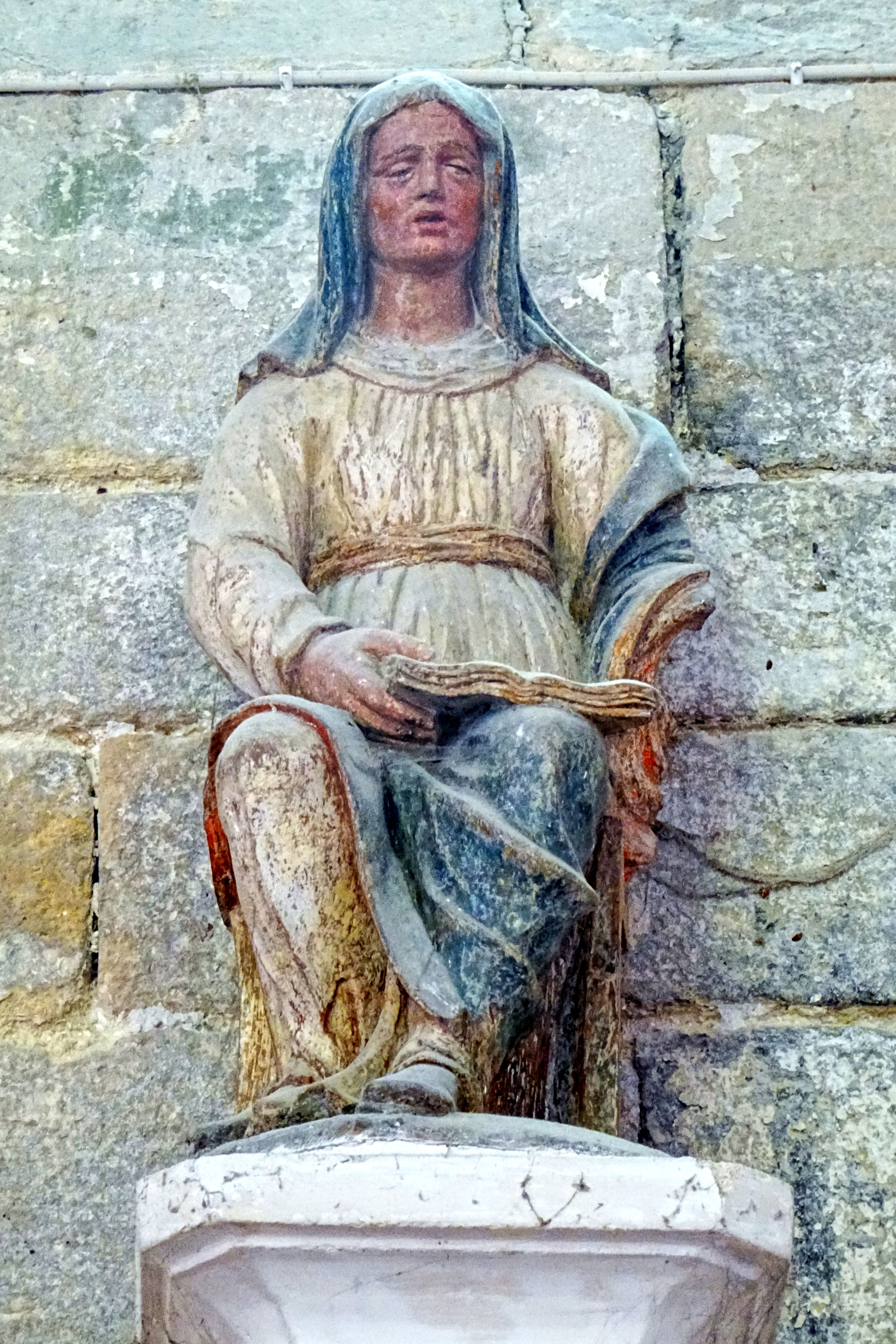 Statue - Éducation de la Vierge (anciennement groupe sculpté avec sainte Anne).